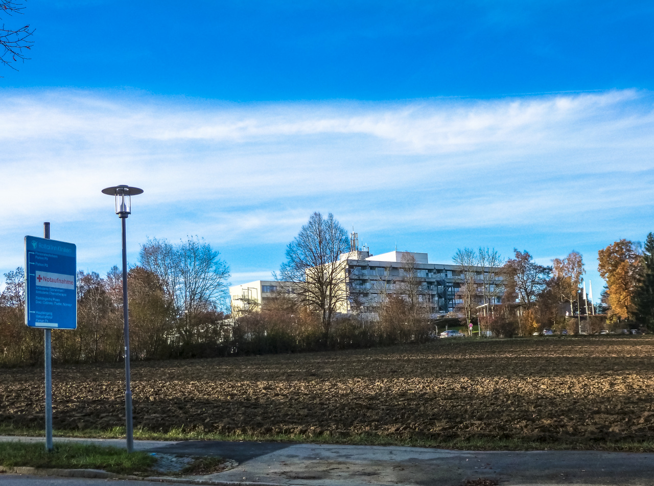 Schwerpunktklinik in Eggenfelden für Allgemeine Innere Medizin